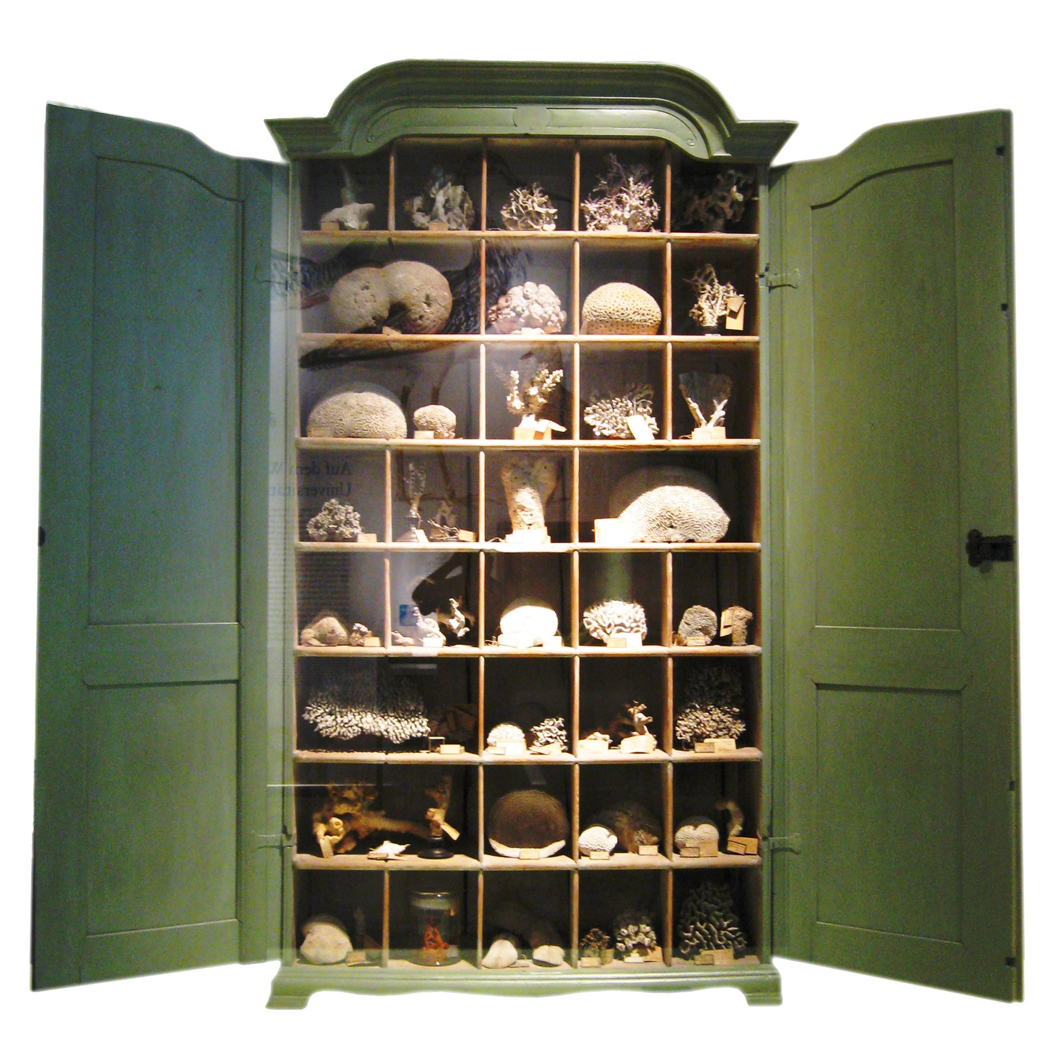 Korallen